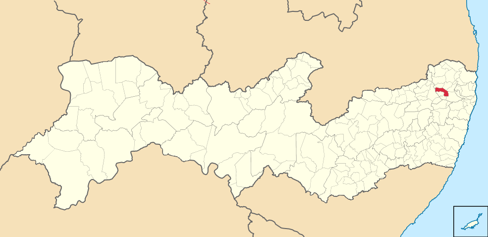 Mapa de Carpina (2)